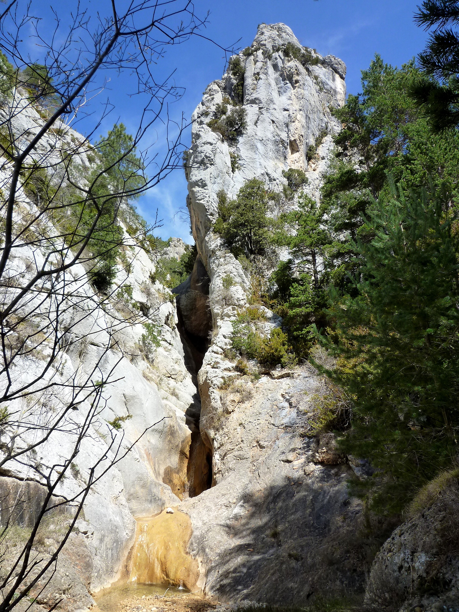 La Garganta. Indret a la rasa dels Forats o de la Barata. La Coma i la Pedra (Solsonès - Catalunya)